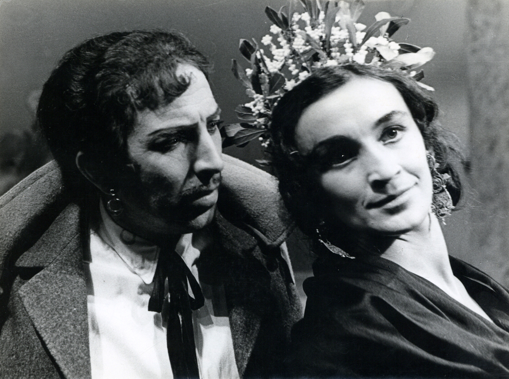 Federico García Lorca, Svatba krvi, Drama SNG v Ljubljani. Na fotografiji: Maks Bajc (Ženin), Ivanka Mežan (Nevesta).